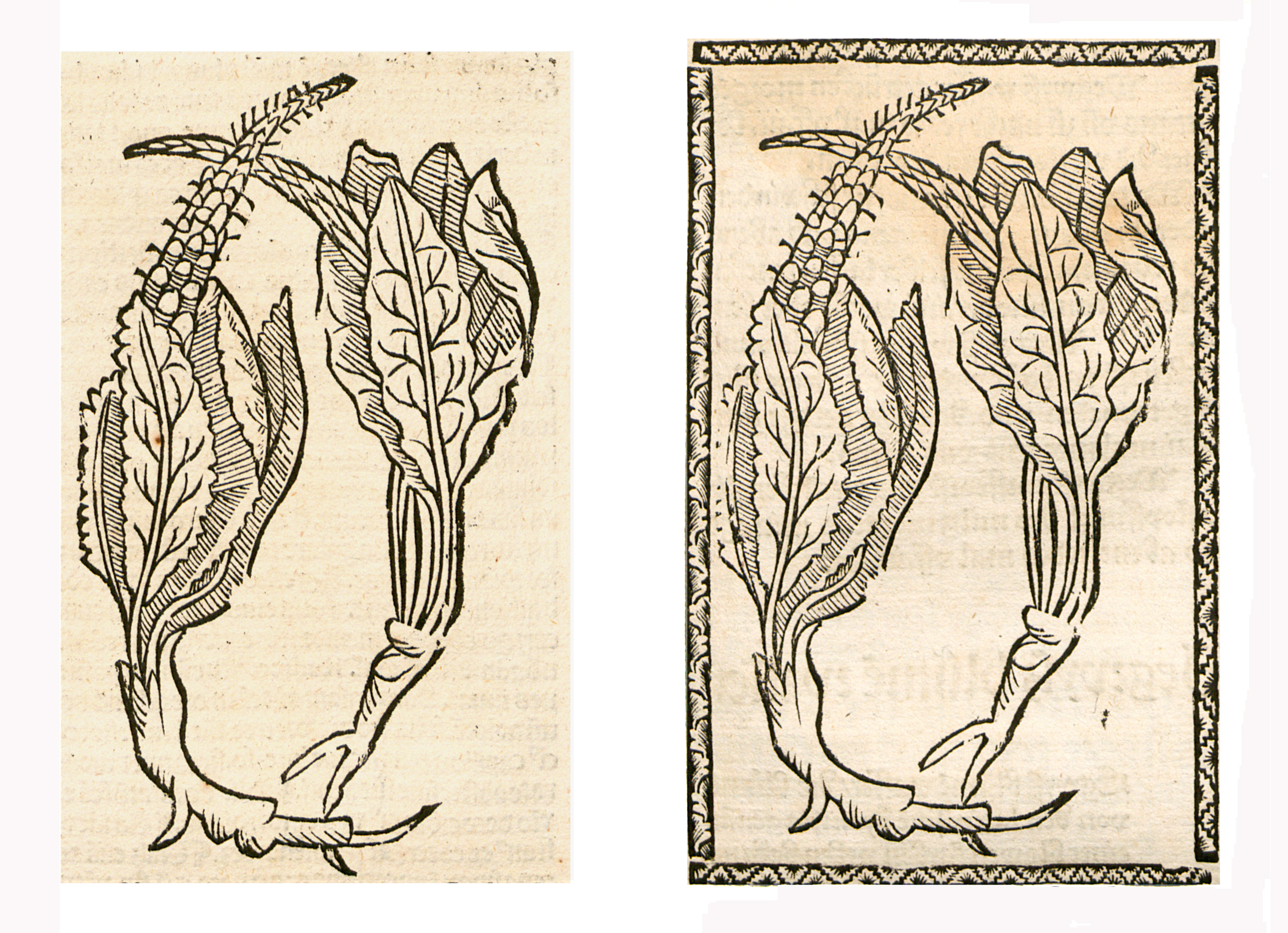 Abbildung von: Wullen (Verbascum phlomoides)